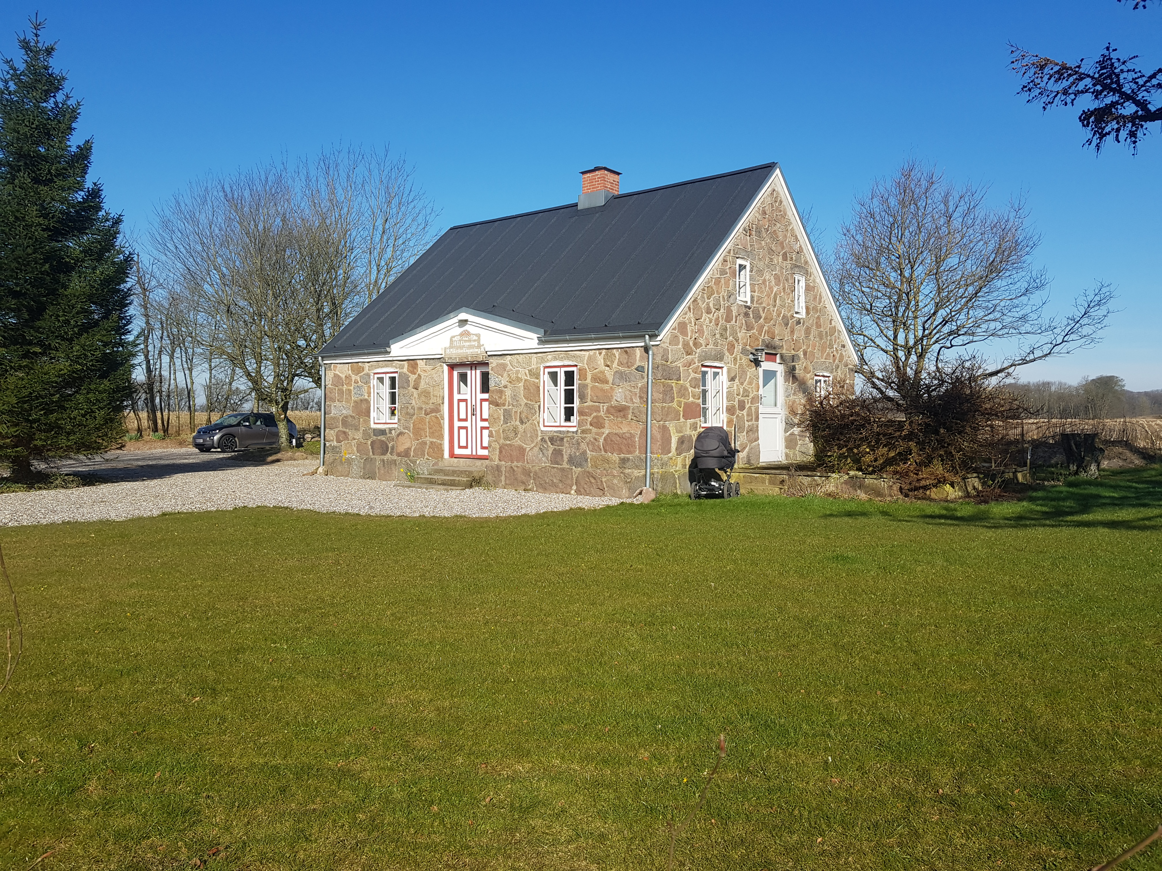 Villa Frihed